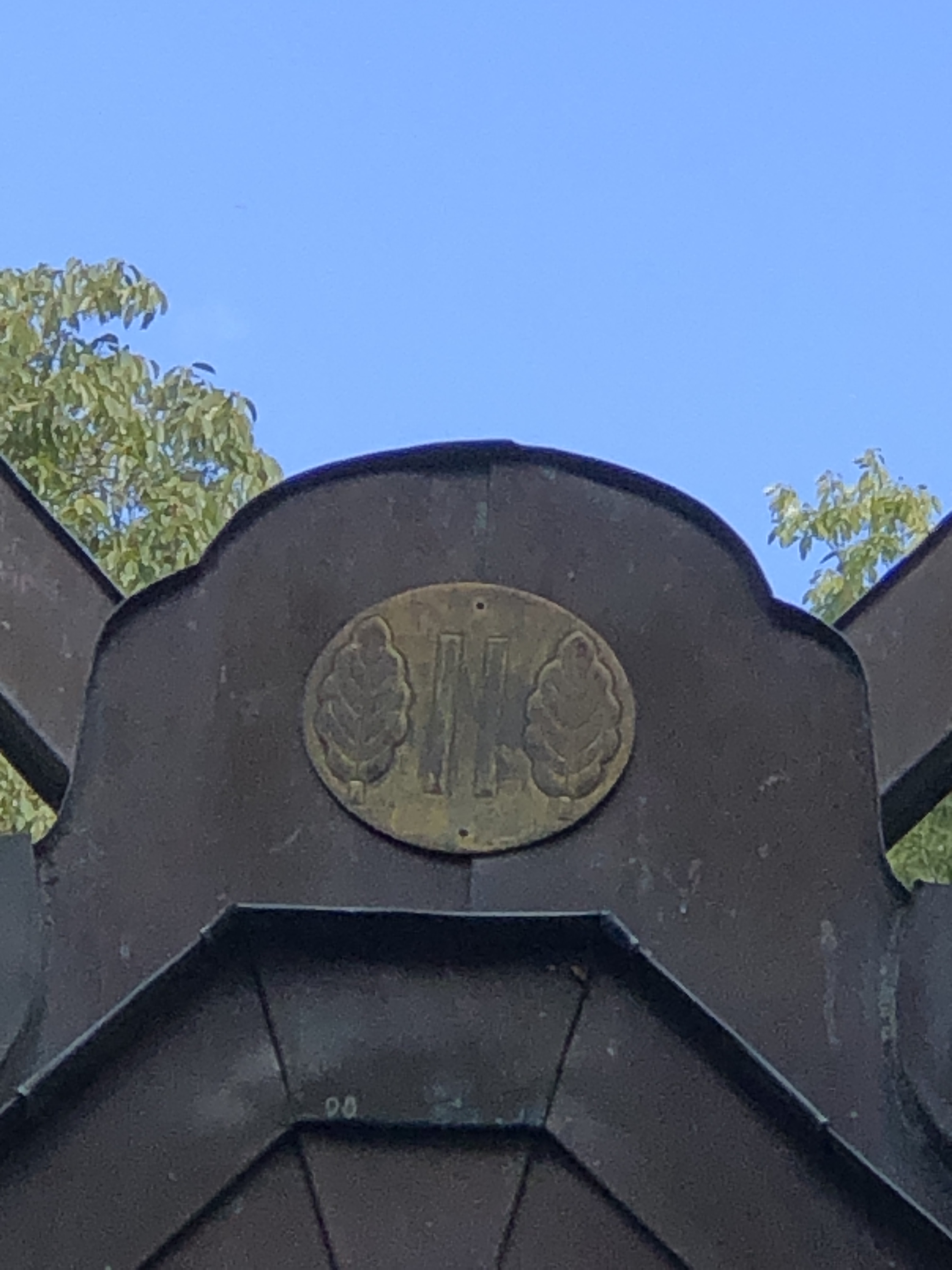 越智氏の勤皇に記された家紋「立引ニ向柏」が、越智氏を祭る在南神社に残る。